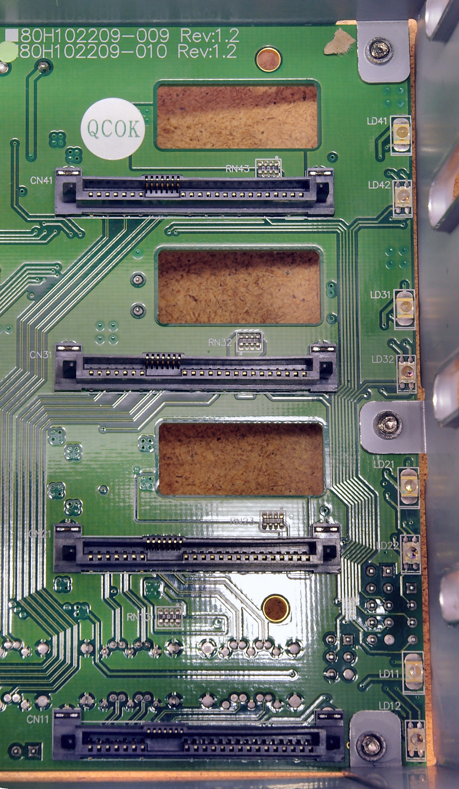 hotplug-fähige SAS-Backplane – Innenansicht eines Vierfach-Rahmens